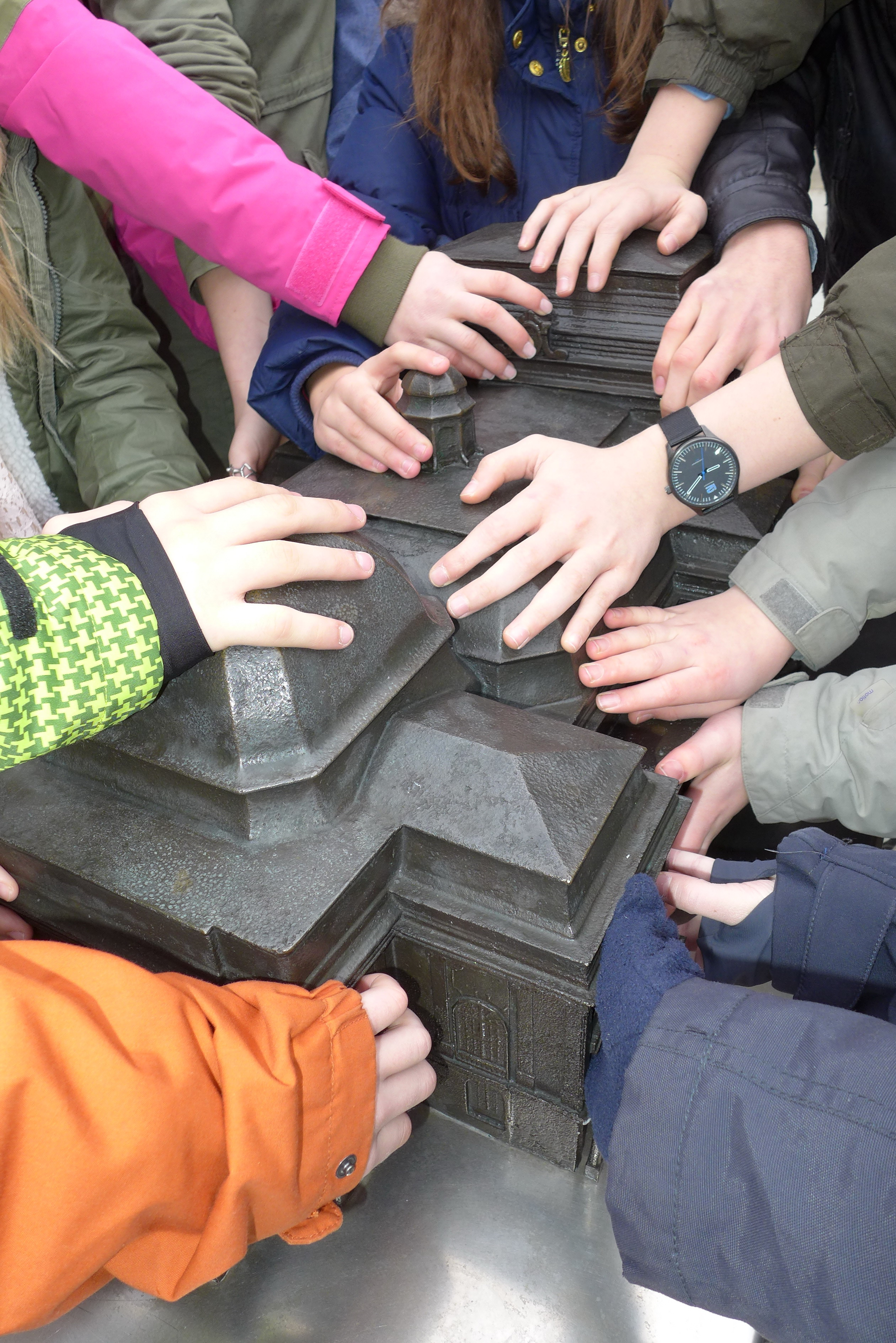 Grazer Opernminiatur 6